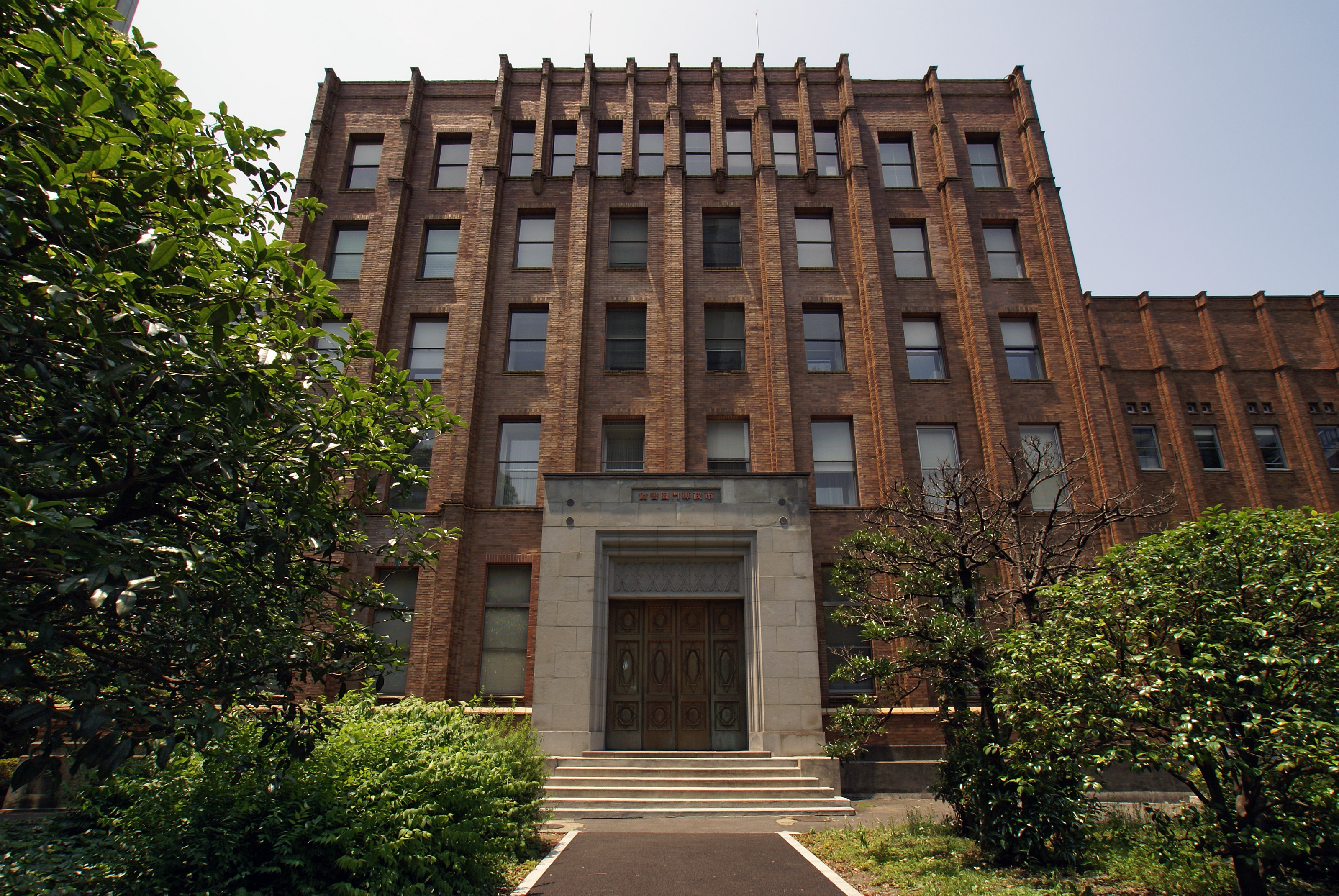 Hibiya Public Hall in Chiyoda-ku, Tokyo, Japan